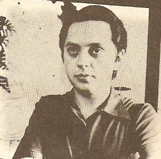 Rodolfo Terragno